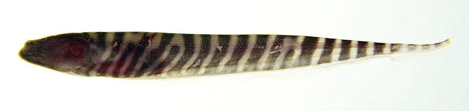 Gymnotus sp.